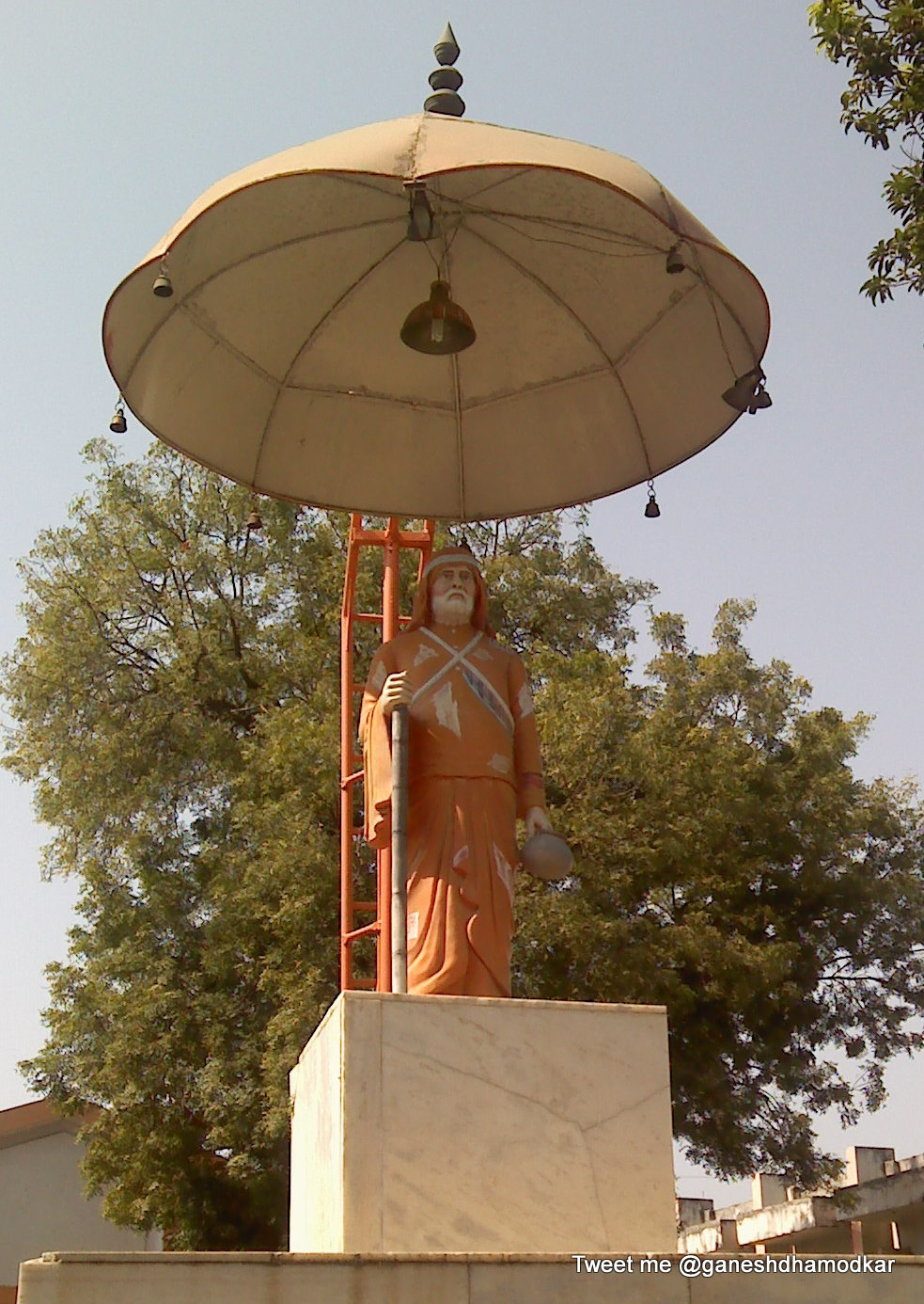 Gadge Maharaj Statue, Gadge Maharaj Dharmashala, Medical Square, Nagpur